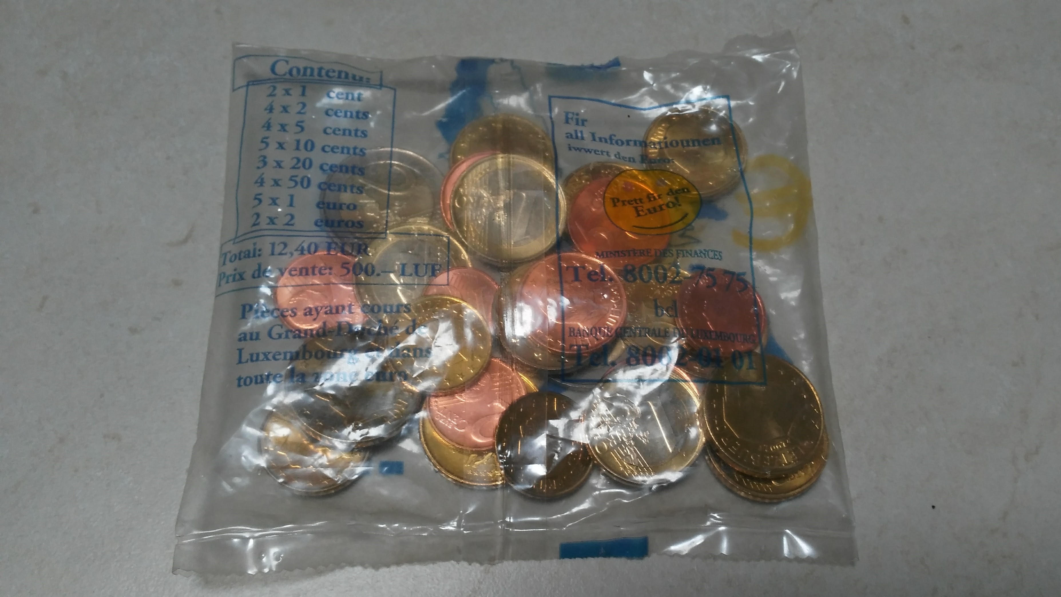 Euro Starterkit aus Luxemburg 2001